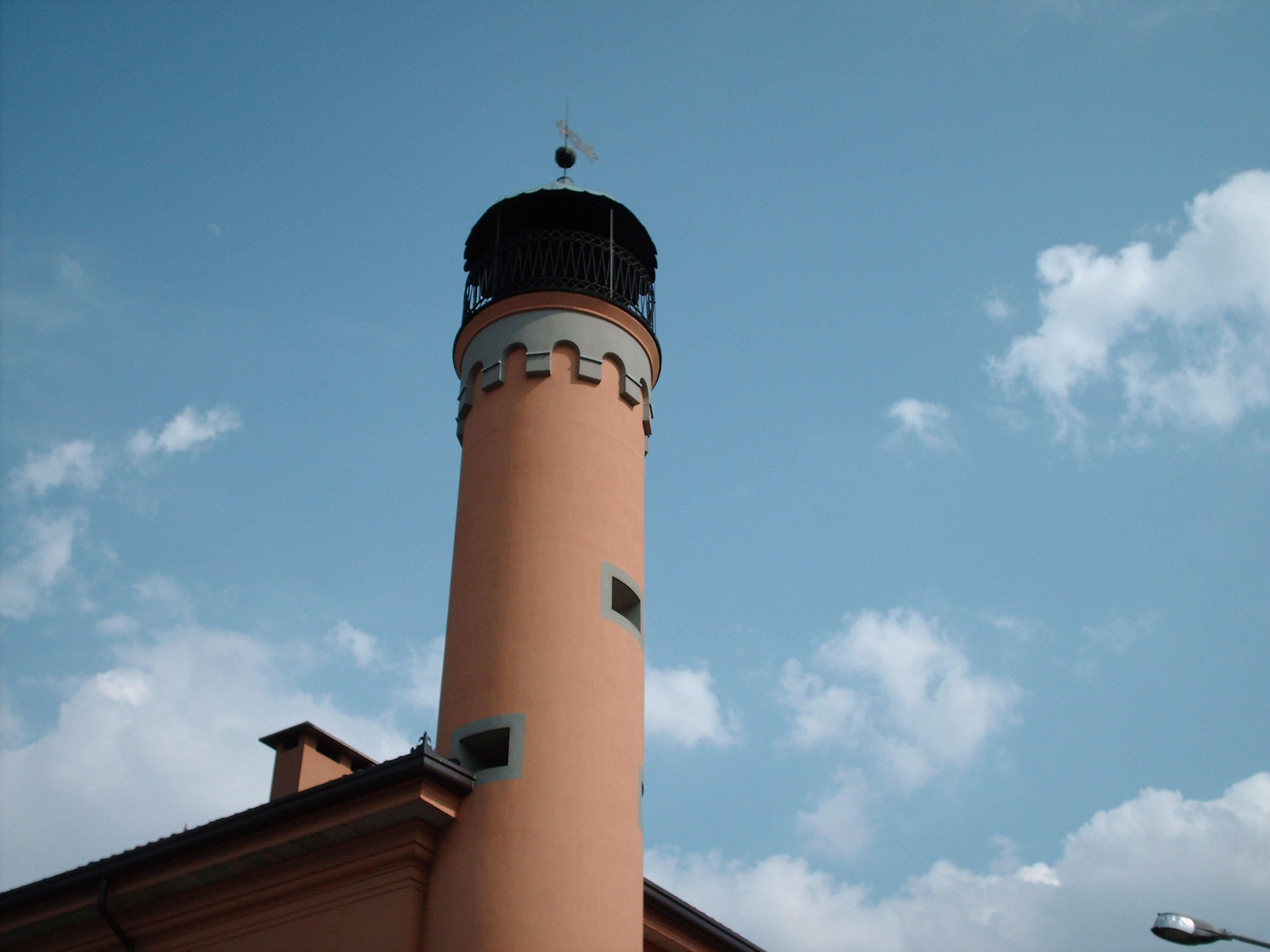 Torre Inveruno